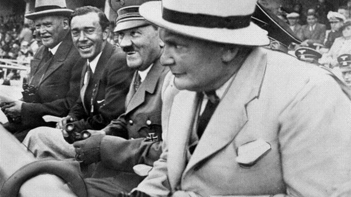 Gustaf Adolf, Hitler & Göring vid berlinolympiaden 1936 1. bis 16. August 1936